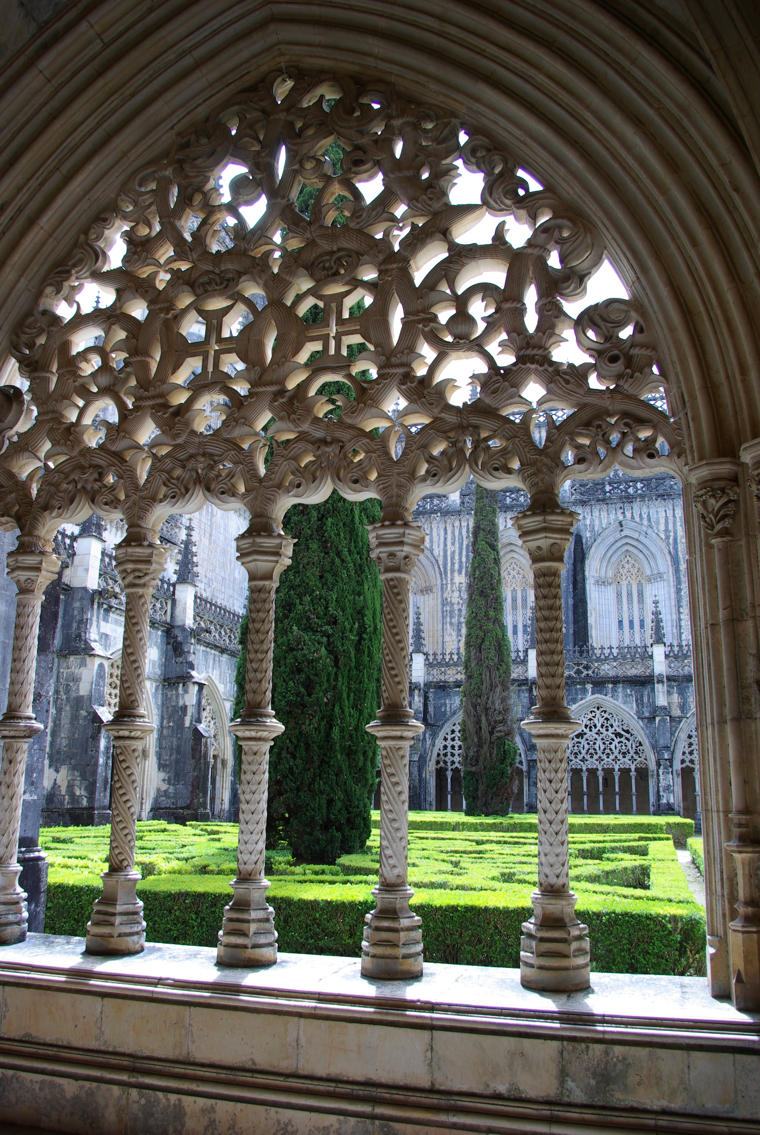 ® BATALHA MOSTEIRO DE BATALHA_CLAUSTRO